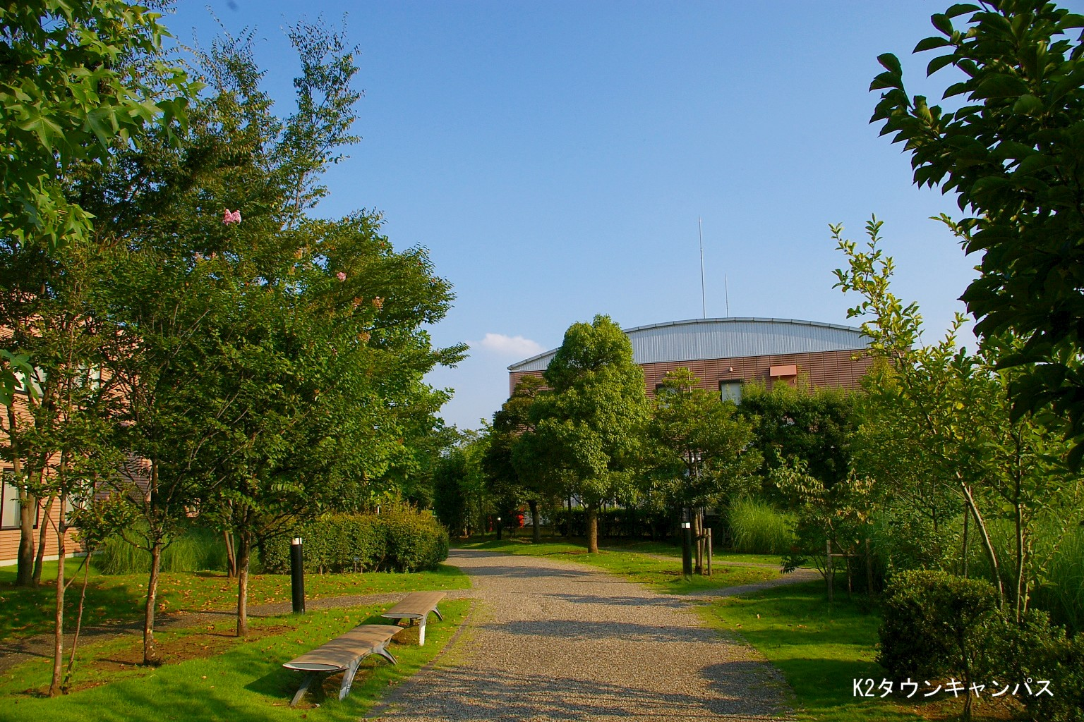 2009.5日本国内で塾生 (talk)が撮影。